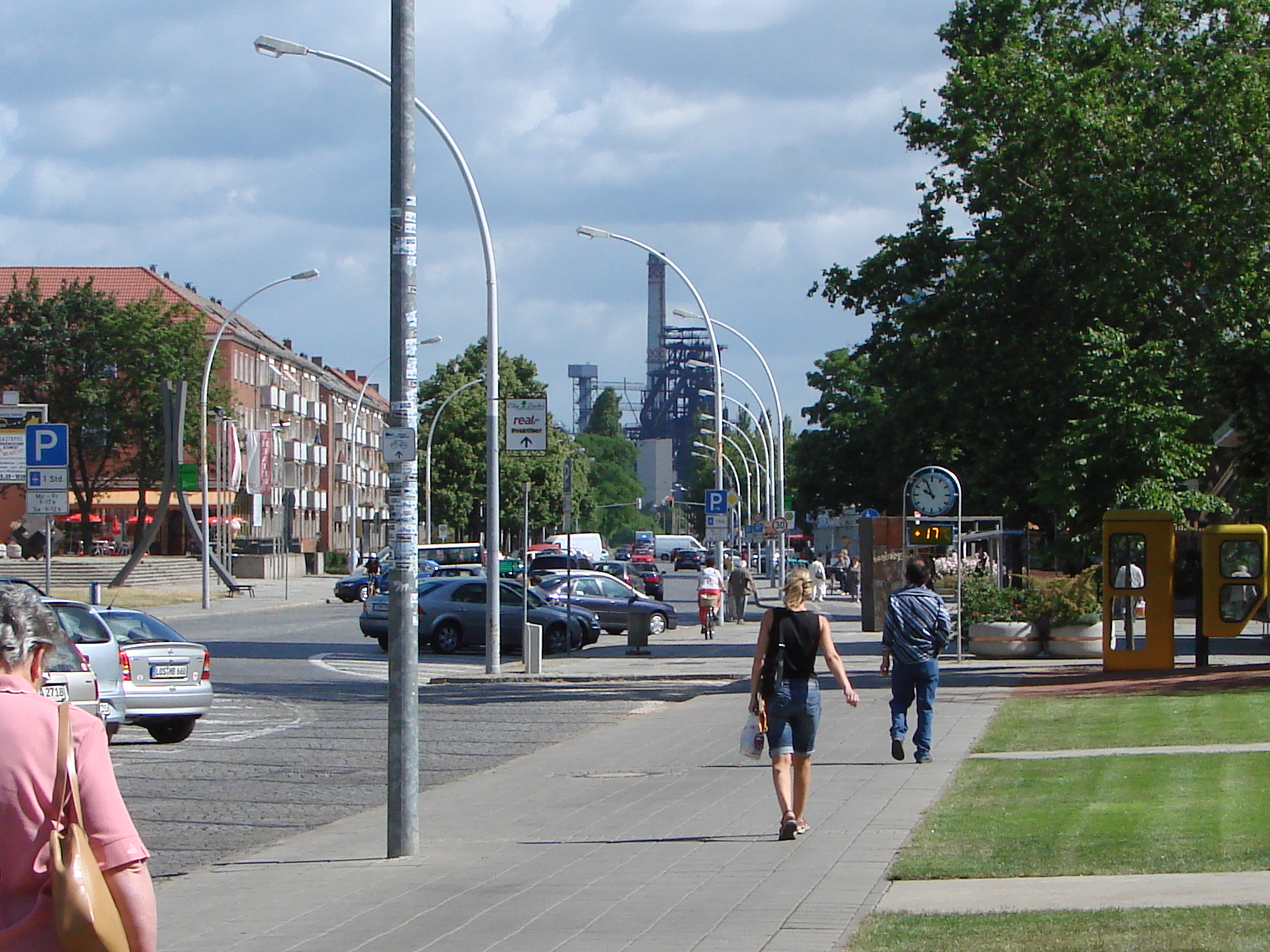 Eisenhüttenstadt Zentrum Blick zum Stahlwerk